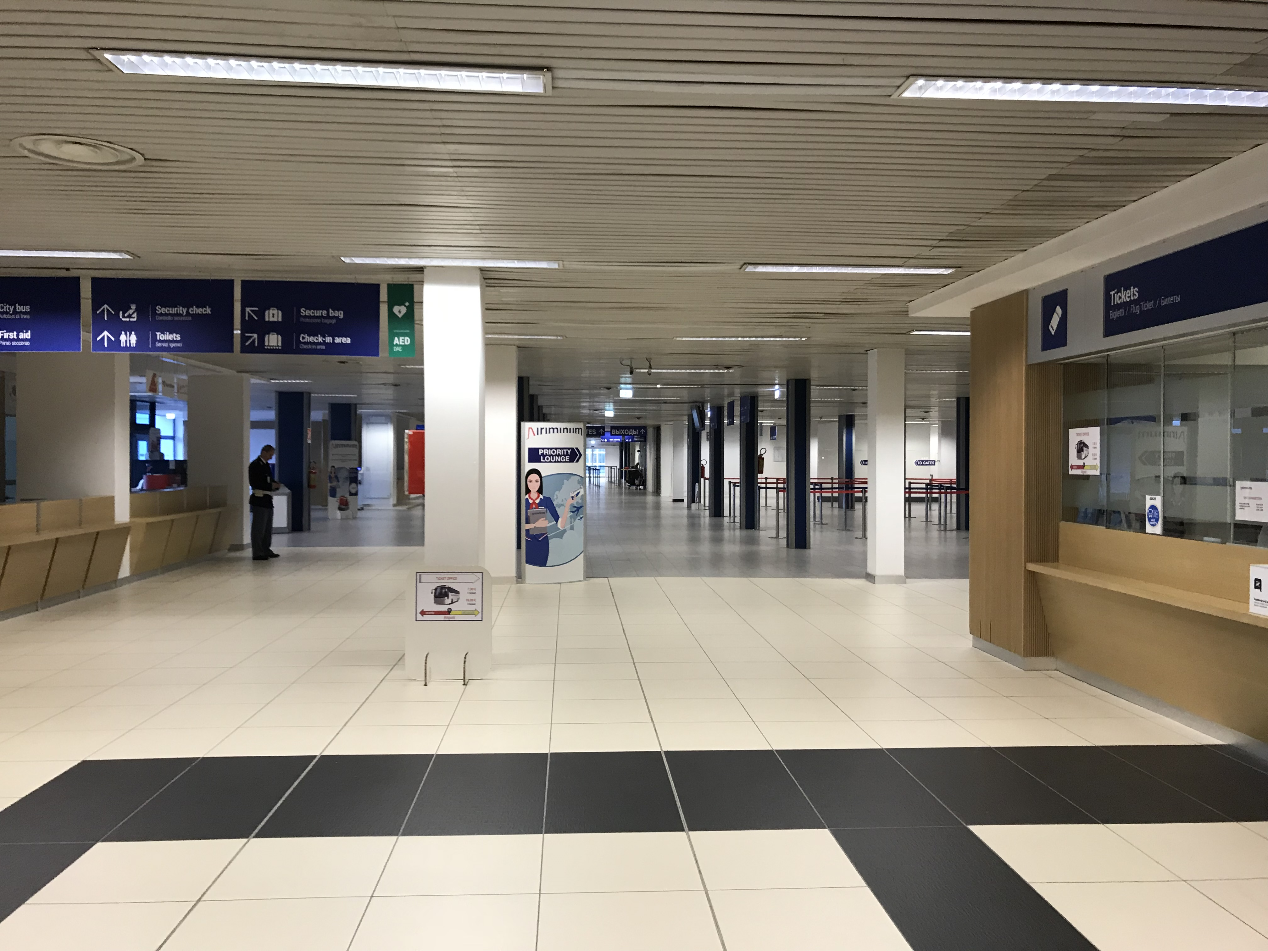 Aeroporto Federico Fellini di Rimini - Corridoio principale